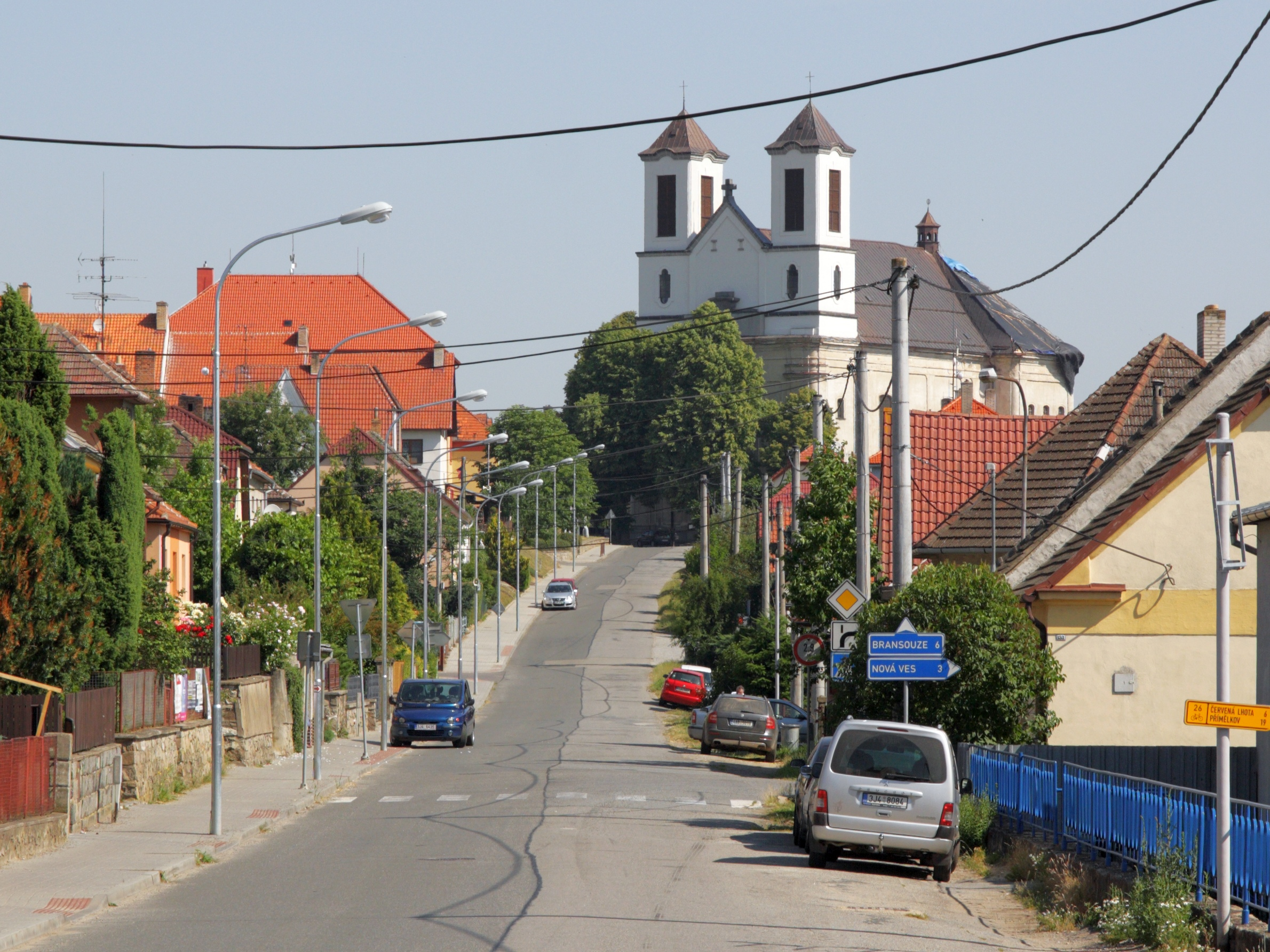 Přibyslavice (okres Třebíč) - ulice Kaštanová.